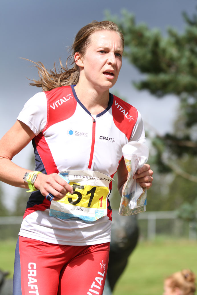 Relay at WOC2010